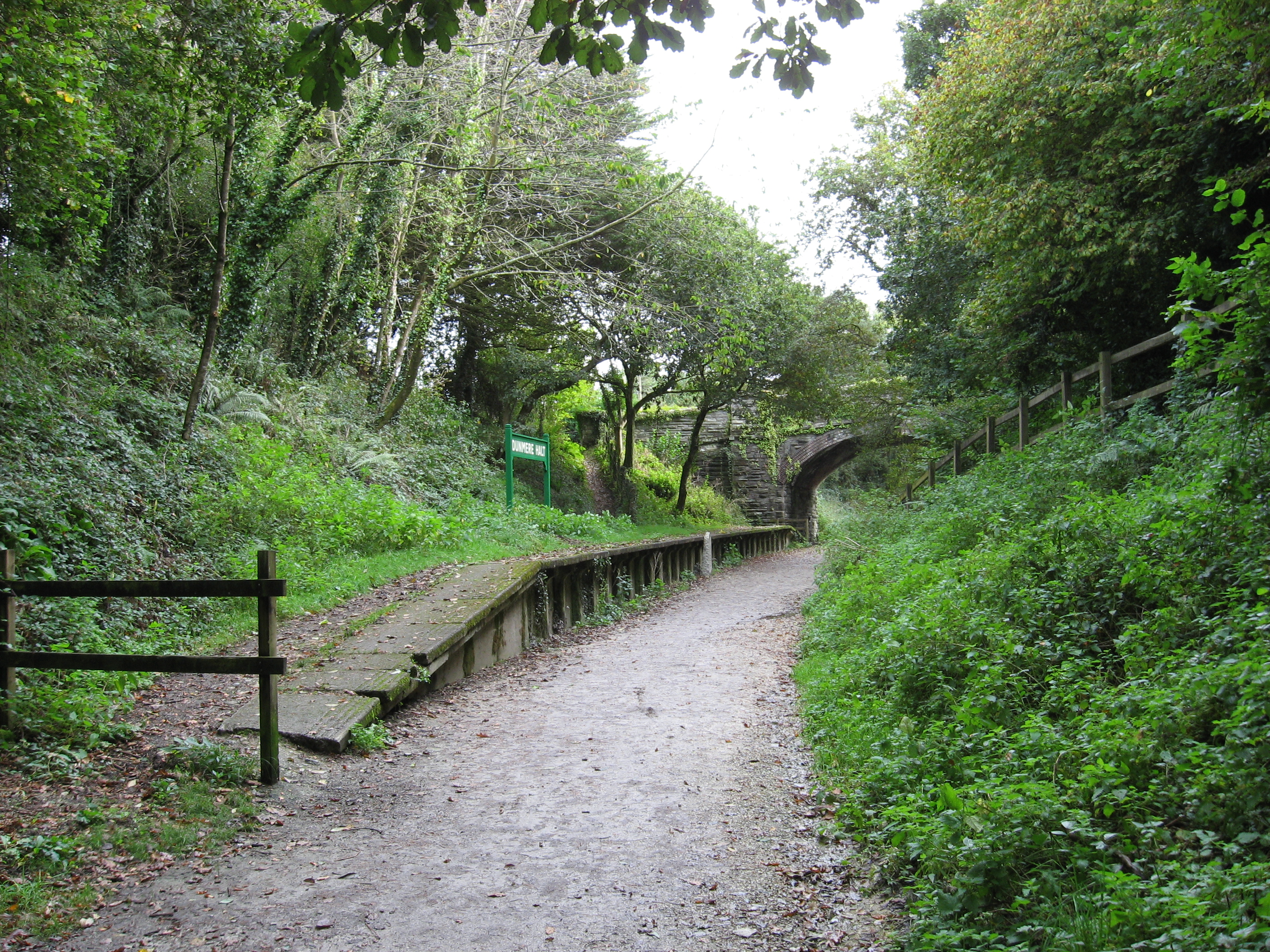 Dunmere Halt.